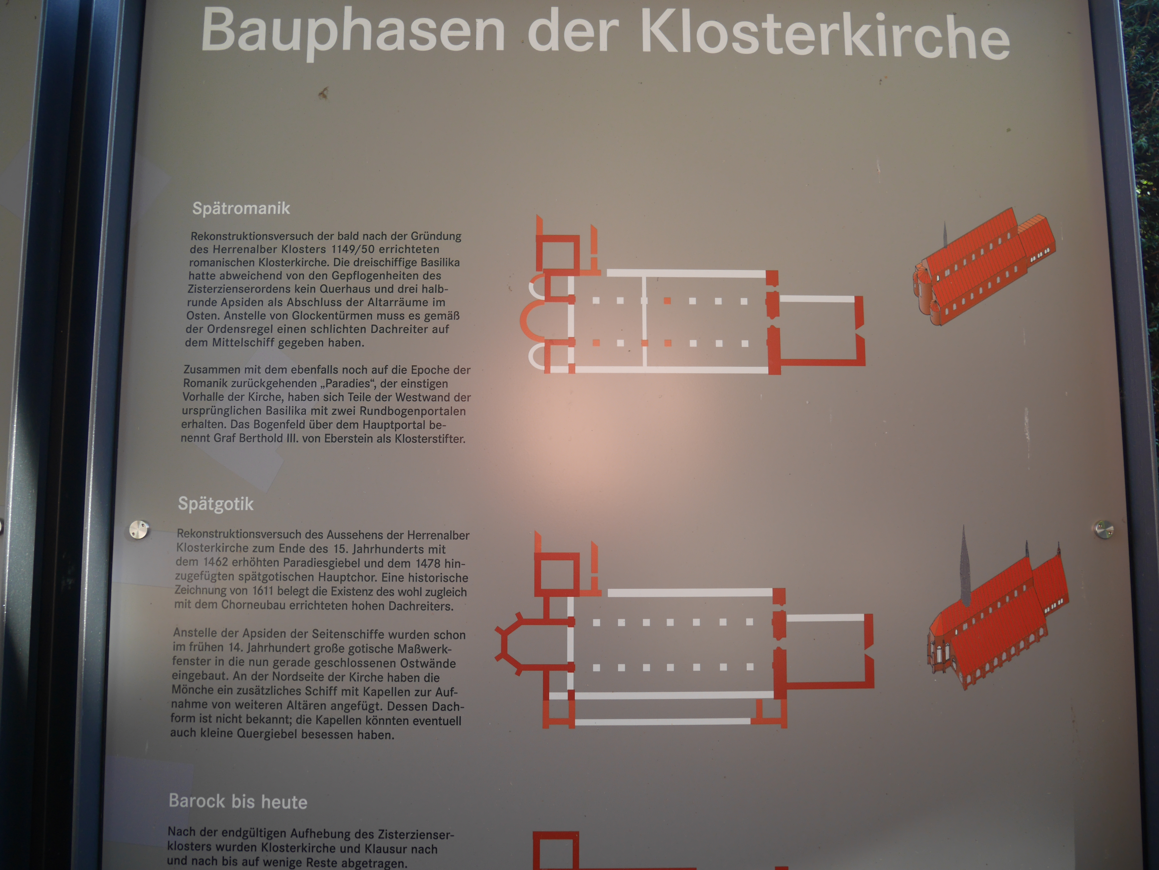 Klosterkirche Herrenalb Bauphasen